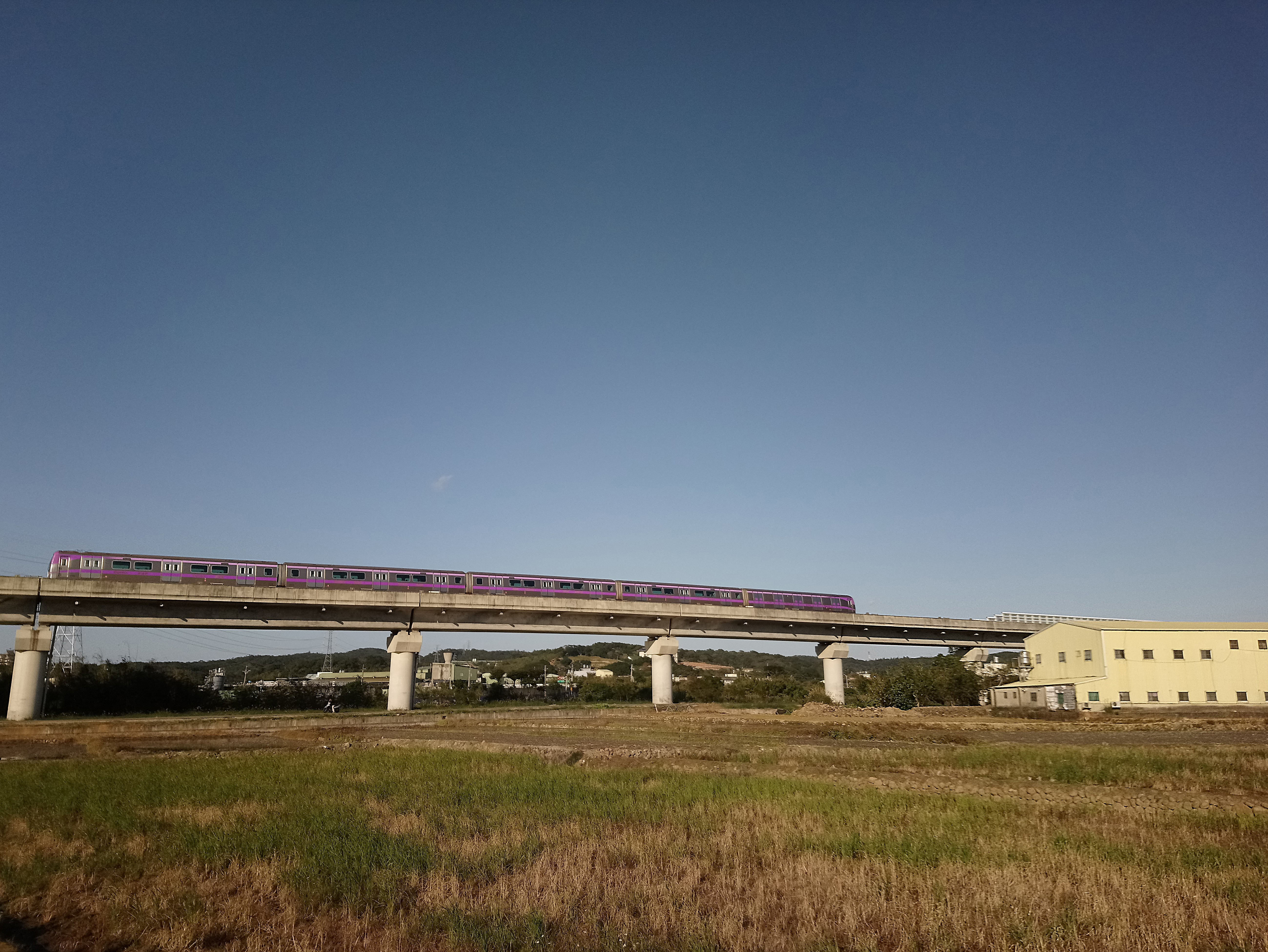 桃園捷運機場線山鼻站～林口站間的直達車,桃園市蘆竹區南崁地區山鼻里